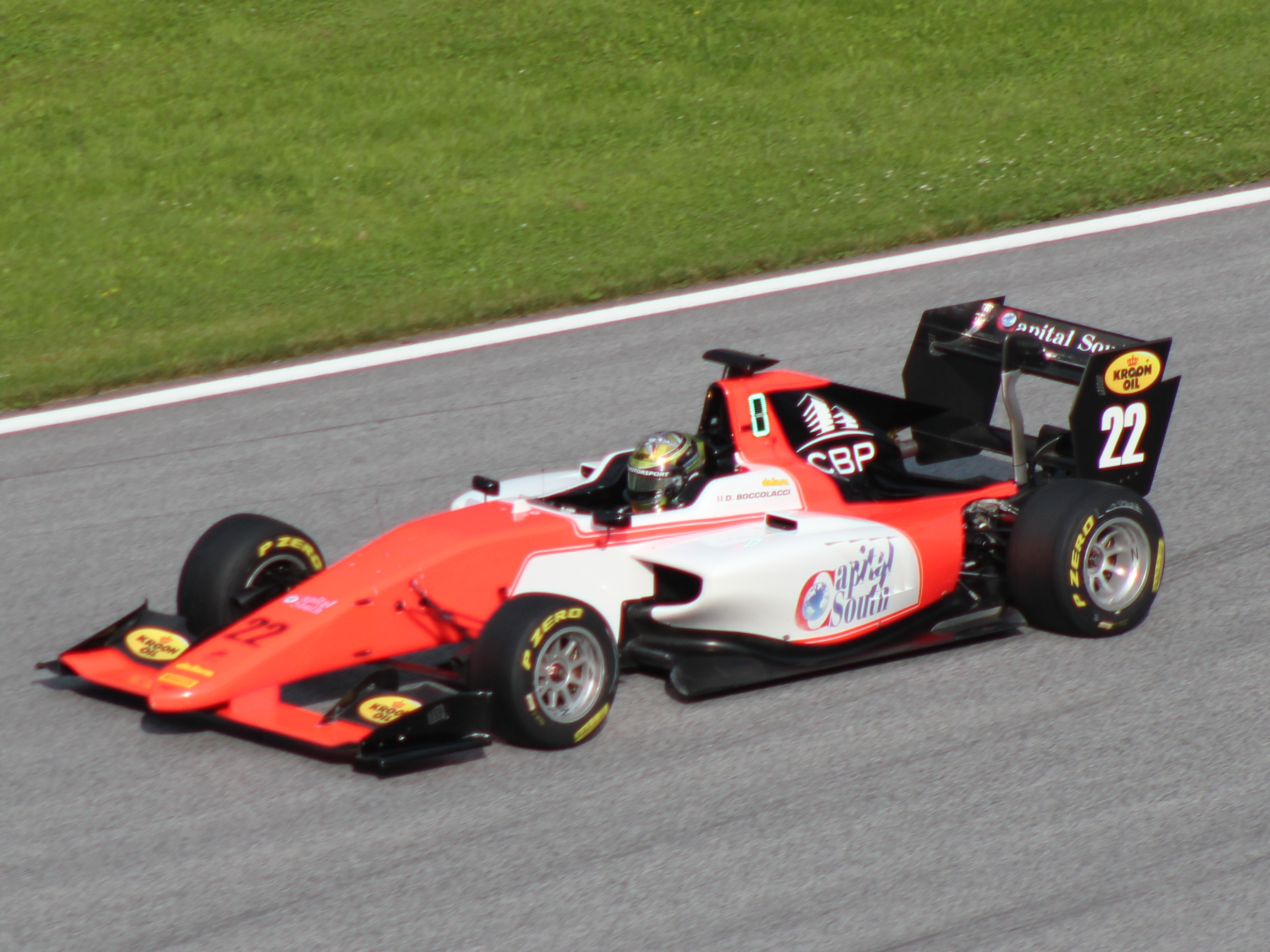 22 Dorian Boccolacci beim Rennwochenende in Österreich 2018